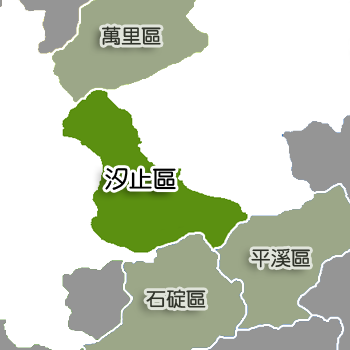 汐止區相對位置。